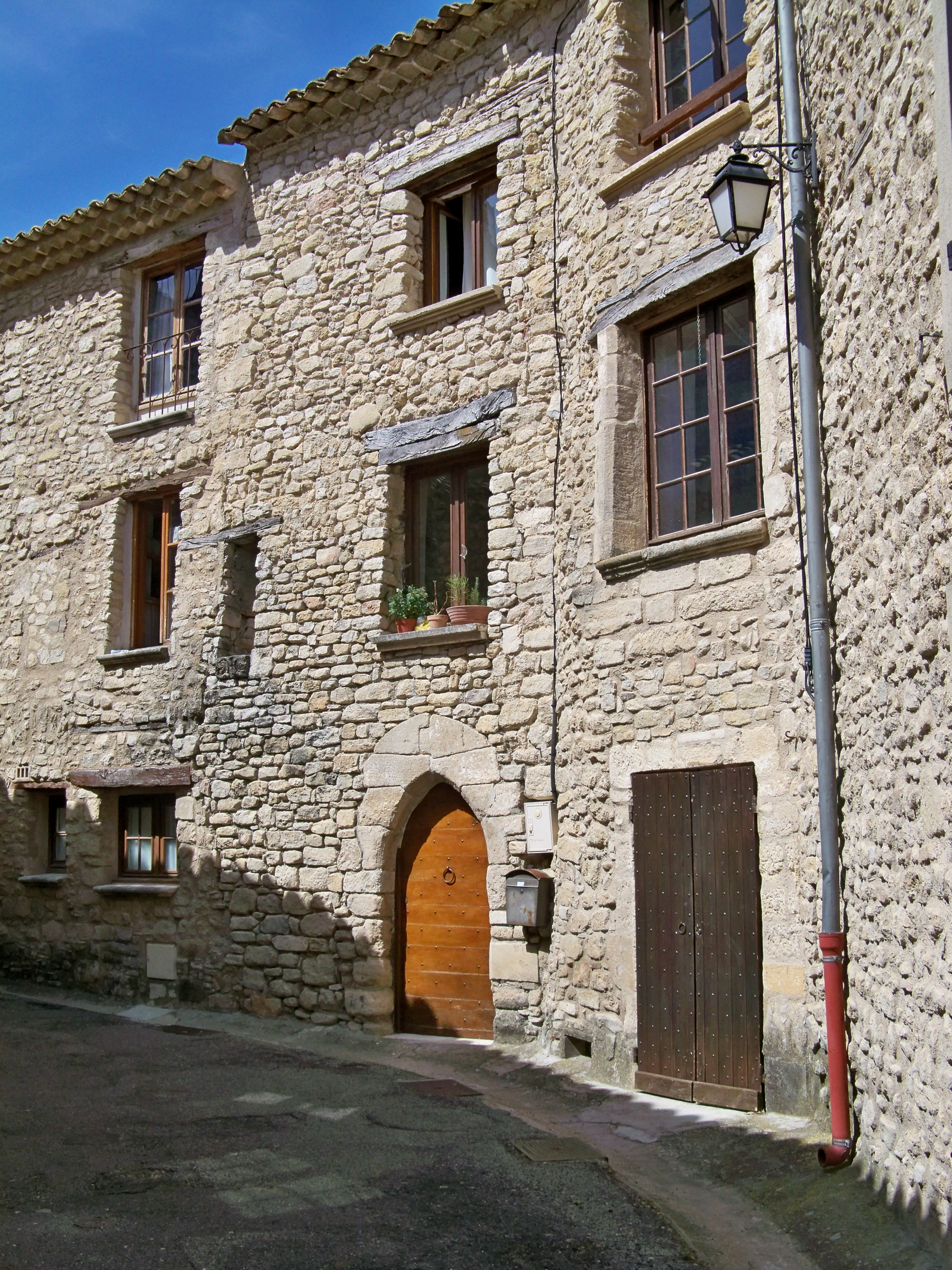 habitat à Saint Martin de Castillon, Vaucluse, France